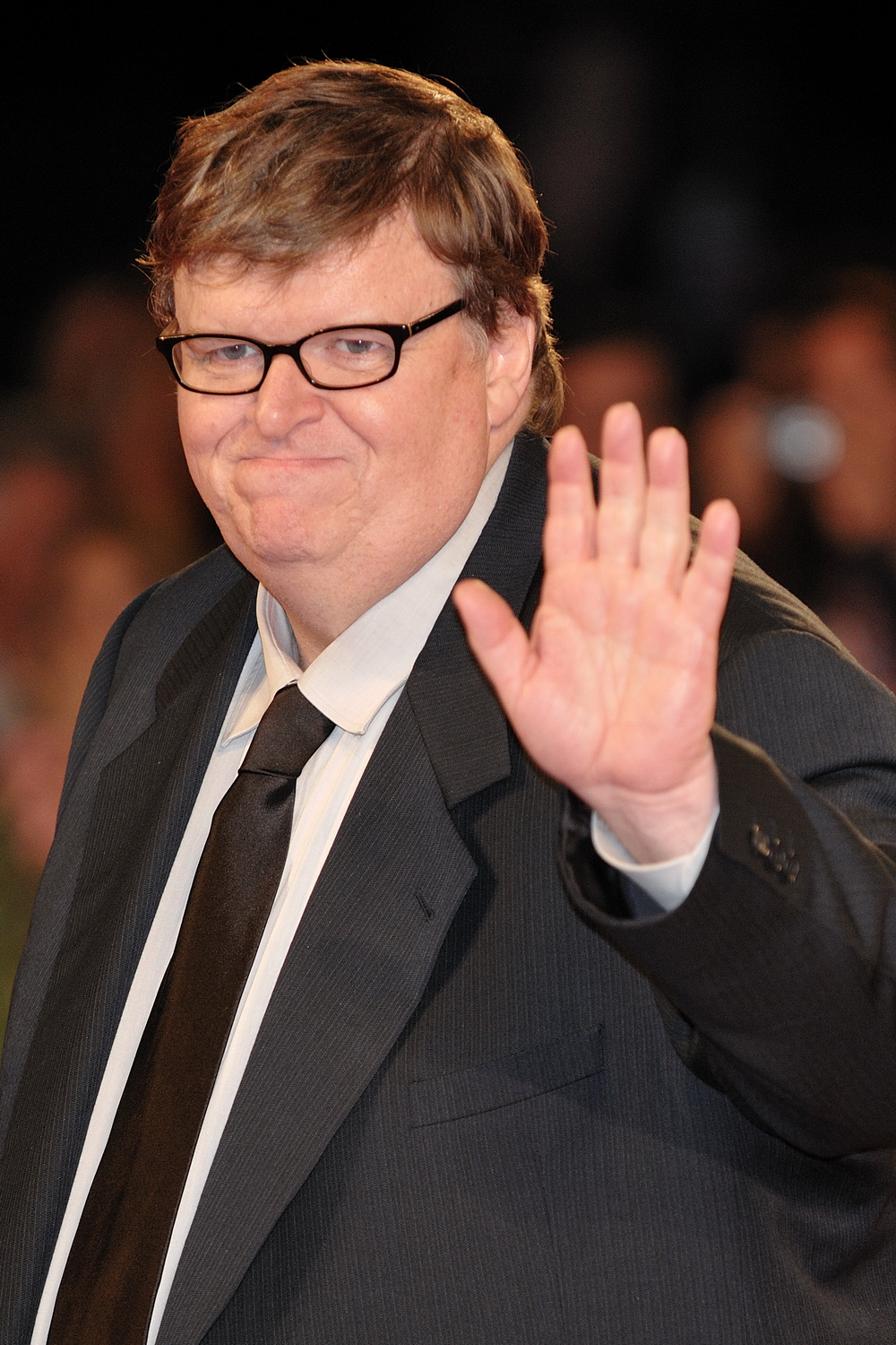 66ème Festival du Cinéma de Venise (Mostra), 5ème jour (06/09/2009) Tapis Rouge avec Michael Moore pour son film en compétition : Capitalism, Love Story